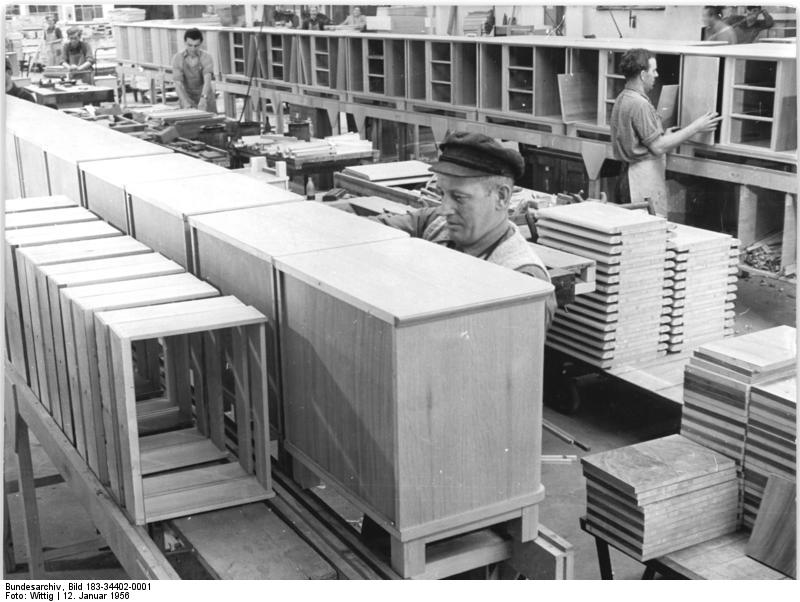 Themar, Möbelfabrik, Produktionsstraße Zentralbild Bez. Red. Erfurt 4 Motive 12.1.1956 Wittig Taktstraße im VEB Südthüringer Möbelwerke. Im VEB Südthüringer Möbelwerke in Themar sind die Taktstraßen zur Montage von Nachtschränken und Frisiertoiletten der Anfang zur großzügigen Umgestaltung des Betriebes im Sinne der Forderung des 25. Plenum der ZK der SED. -Nach einem schon heute feststehenden Perpektivplan für den Verlauf des 2. Fünfjahrplanes wird bereits seit Beginn des Jahres 1956 mit der Verwirklichung dieser Forderung begonnen. Bis zum Jahre 1960 sollen sämtliche Arbeiten der Verrichtsreihen und der Montageabteilungen weitgehendst mechanisiert sein. Nach Verwirklichung des gesamten Perspektivplanes hat das Werk die Möglichkeit, seine derzeitige Produktion zu verdoppeln. U.Bz.: Alle 15 (eins fünf) Minuten verlassen seit einigen Tagen zwei Nachtschränke und eine Kommode die neu in Betrieb genommene Taktstraße der Montageabteilung. Blick auf die "Nachtschrank-Taktsrasse" (im Vordergrund) und die "Frisiertoilletten-Taktstraße" (im Hintergrund). Im Vordergrund der Tischler Johann Trenk.